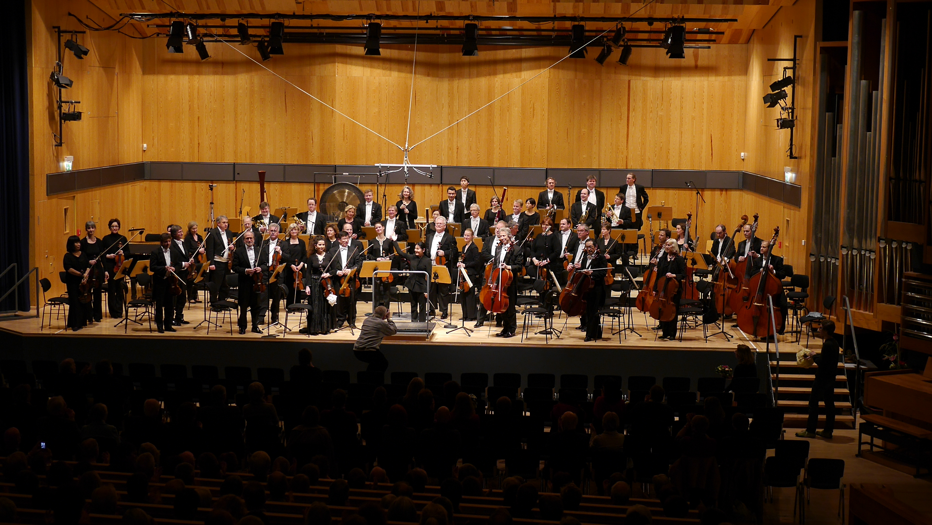 Dirigentenwerkstatt mit Bachelorprüfung am 20.02.2014 im Konzerthaus der HfM-Detmold mit der Philharmonie Südwestfalen. Eine Kooperation der Hochschulen für Musik Köln, Detmold und Frankfurt/Main. Ludwig van Beethoven (1770–1827): Symphonie Nr. 5 c-Moll op. 67 „Schicksals-Symphonie“ Dirigentin: Naoko Sakai, (Klasse Prof. Karl-Heinz Bloemeke, Detmold)